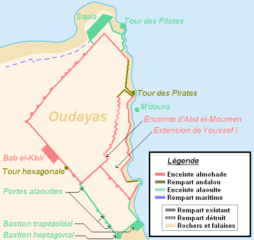 Carte des enceintes de la Casbah des Oudayas (travail personnel)